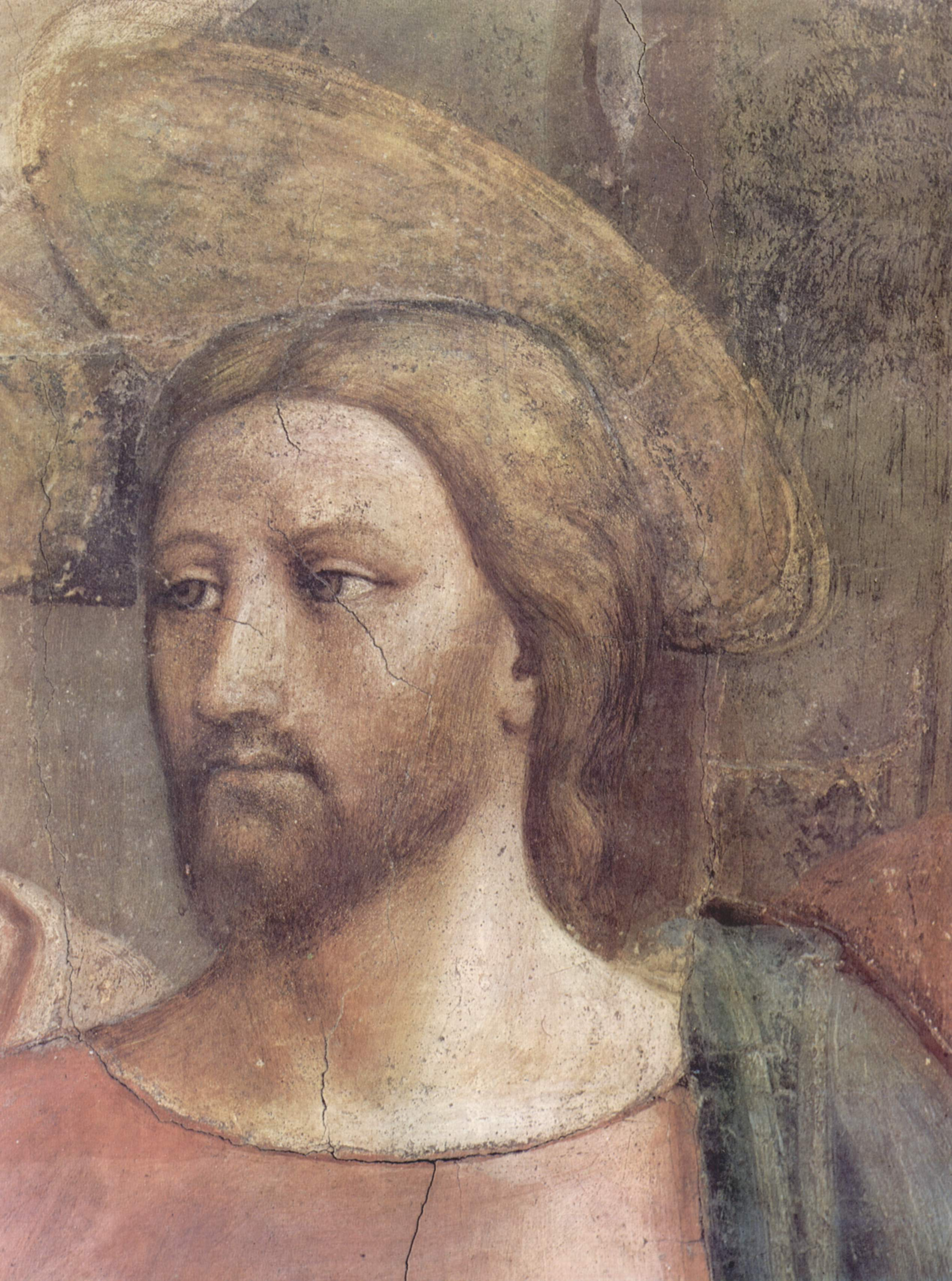 Freskenzyklus der Brancacci-Kapelle in Santa Maria del Carmine in Florenz